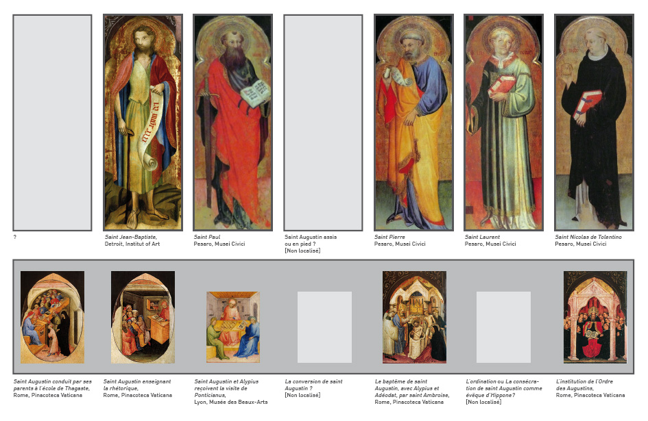 Reconstitution